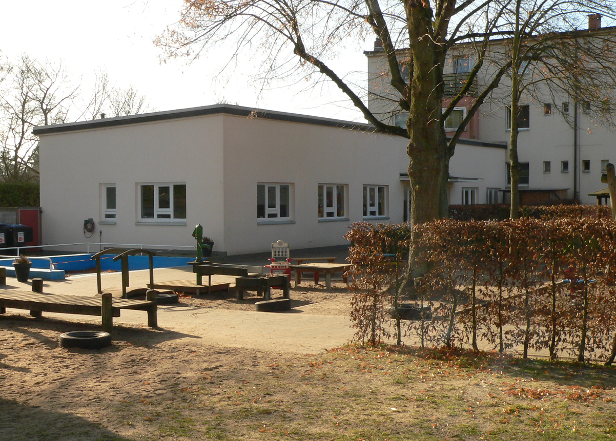 Siedlung Georgsgarten in Celle mit Kindergarten